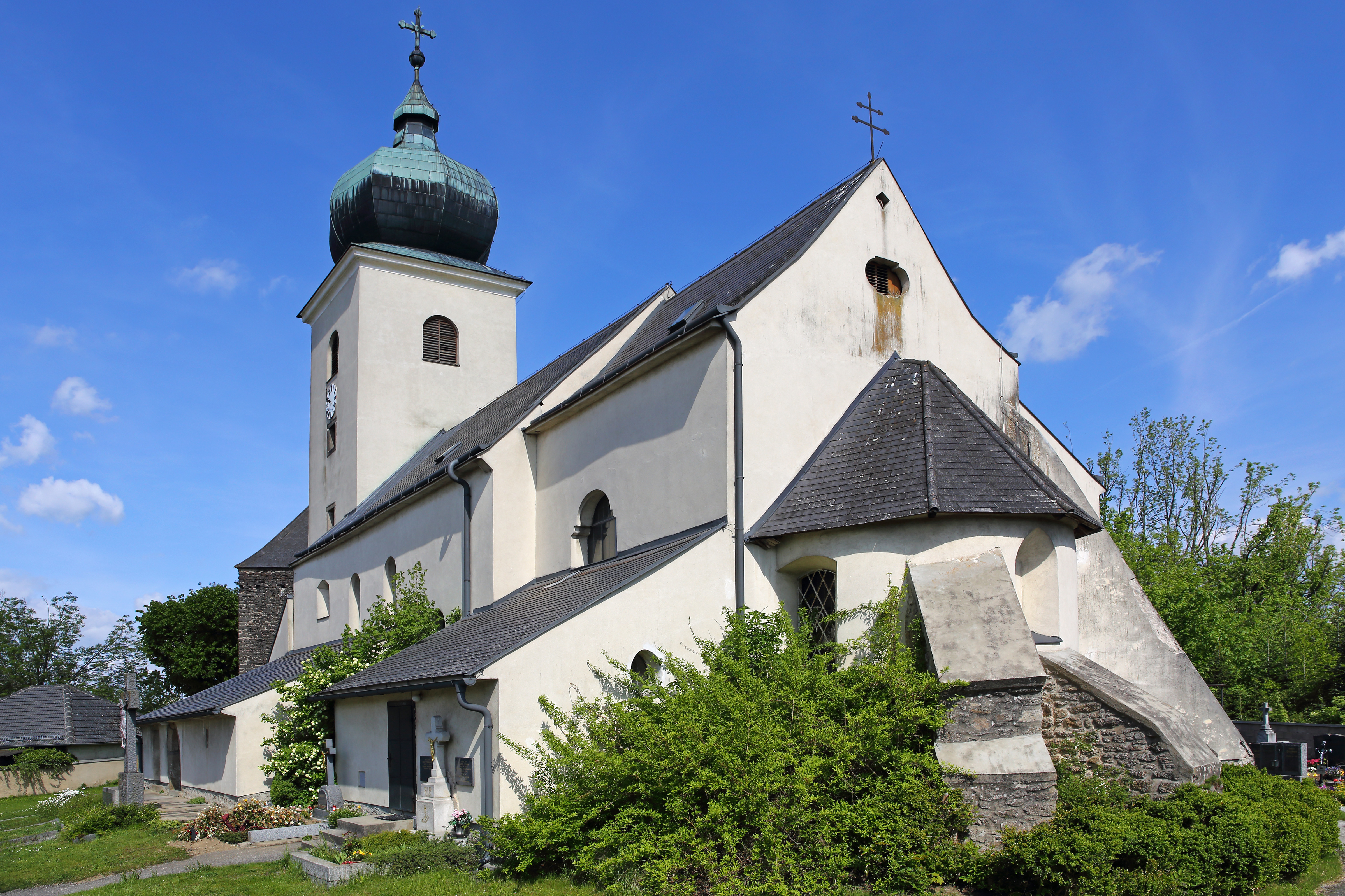 Kath. Pfarrkirche hl. Johannes der Täufer in Weißenalbern (Bezirk Gmünd)